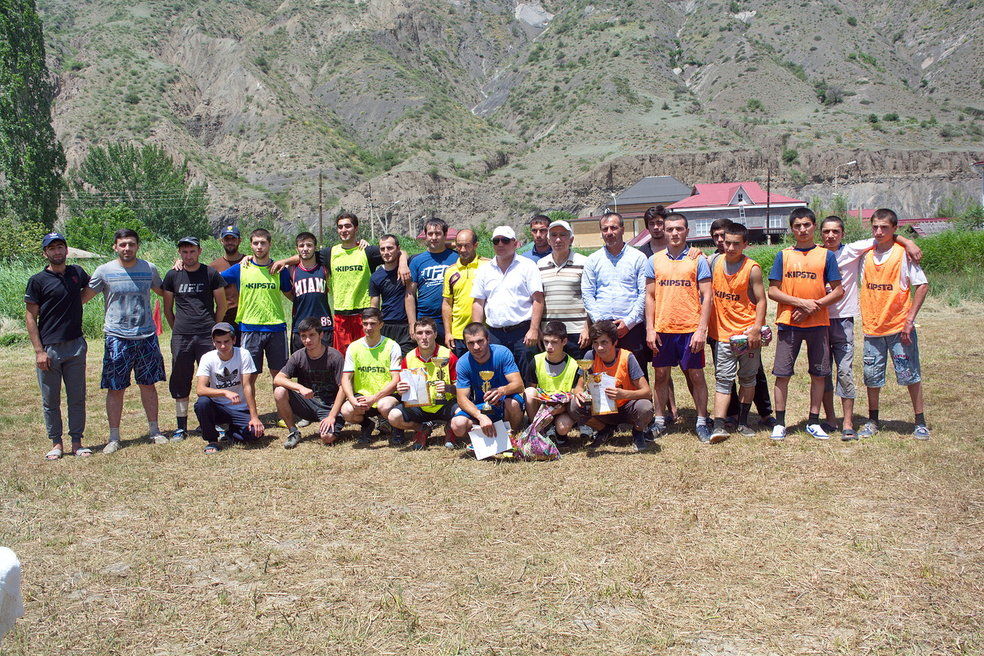 Ежегодный футбольный турнир на призы Алишева Магомеда. В турнире участвуют свыше пяти команд.